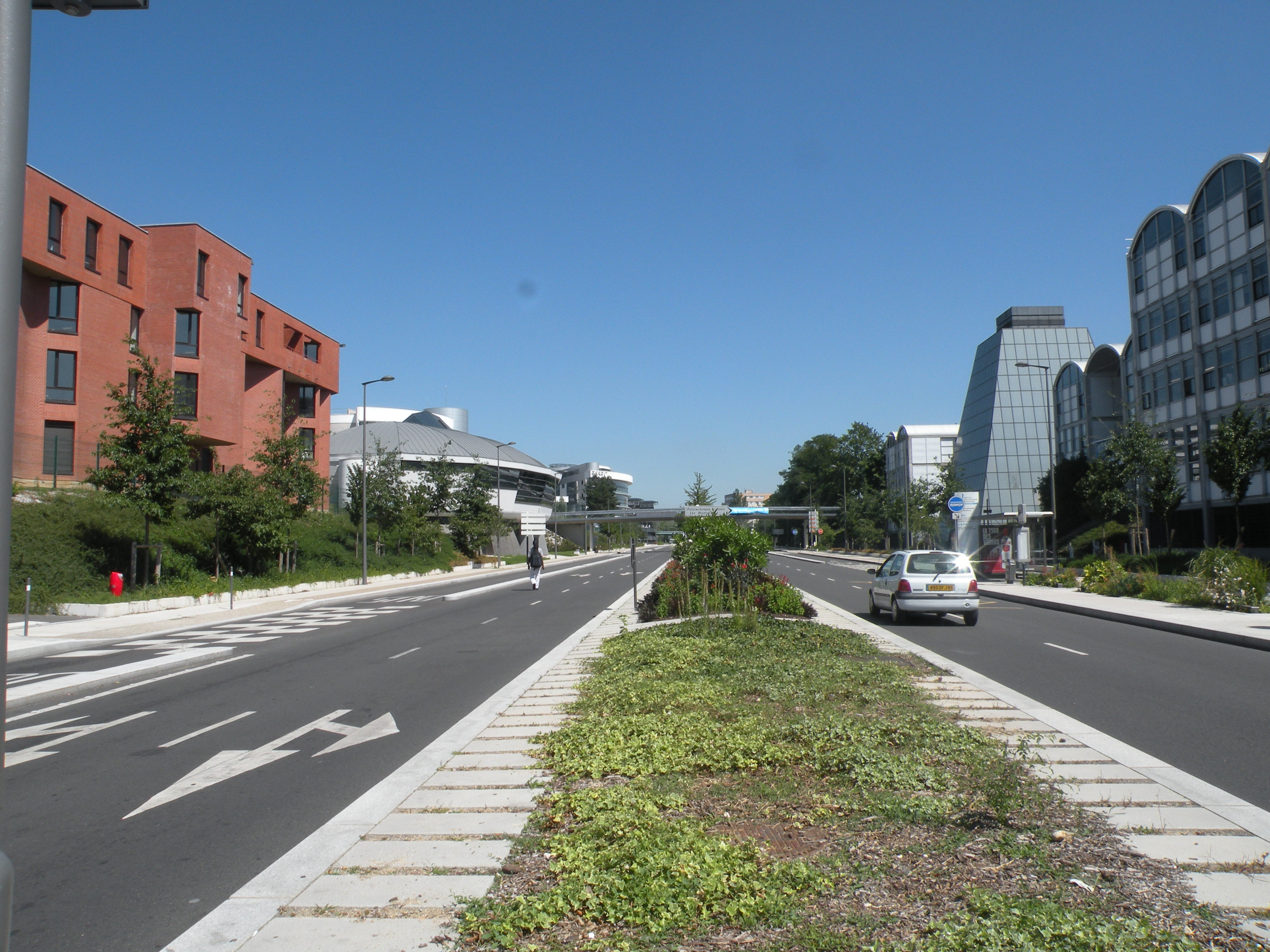 Boulevard de l'Hautil à Cergy (Val-d'Oise, France)